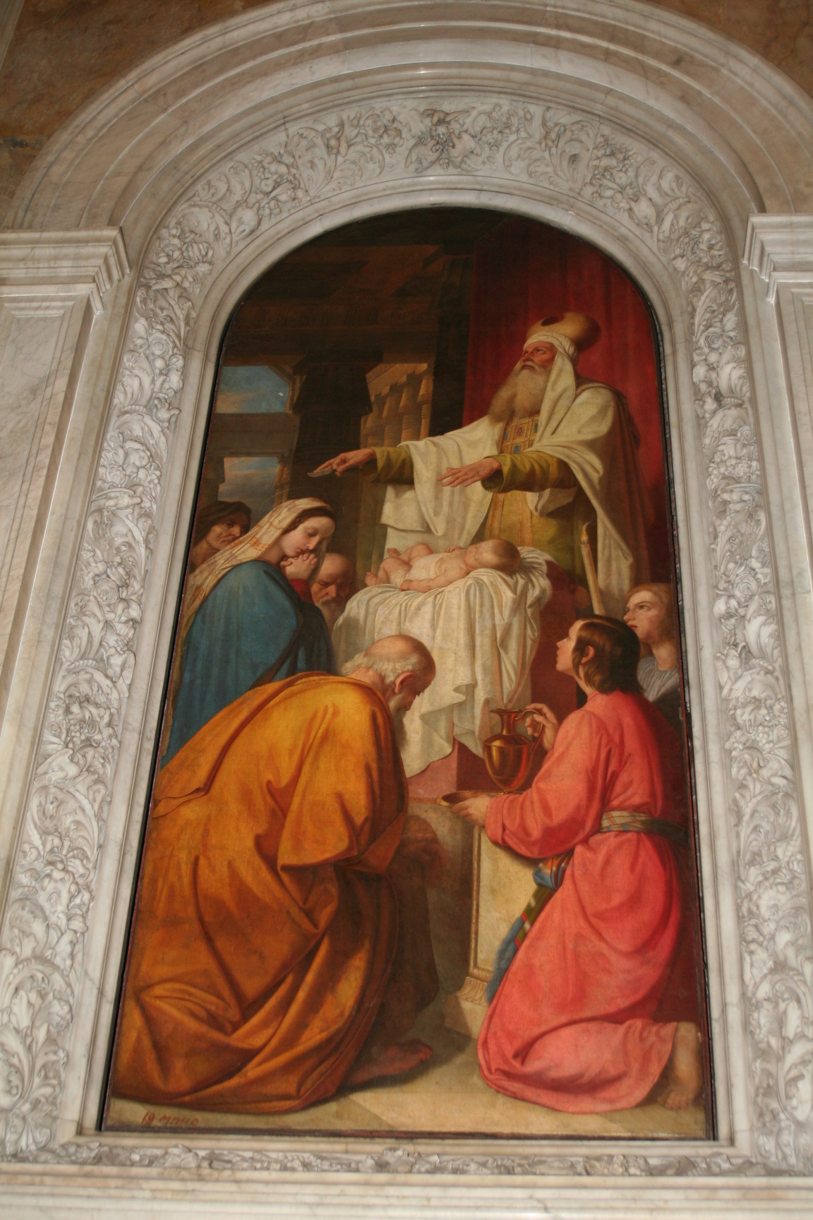 Исаакиевский собор (интерьеры)